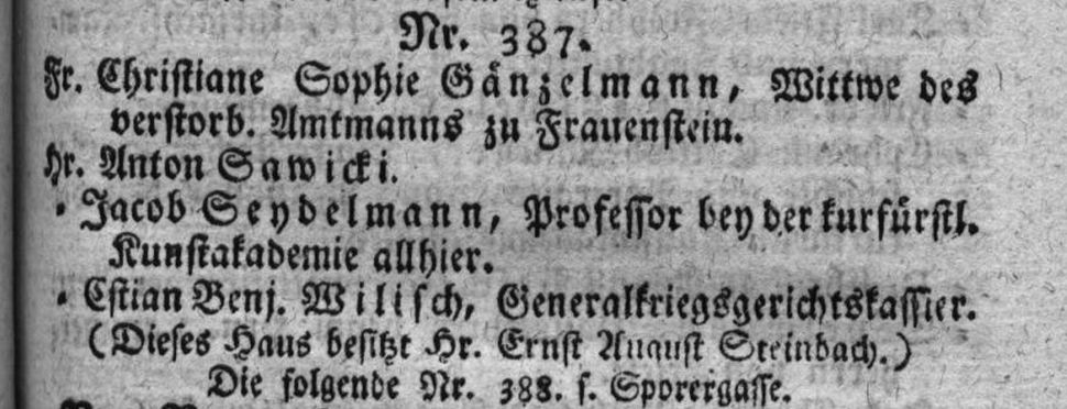 Eintrag zum Dinglingerhaus, Jüdenhof 5 (vorher Haus Jüdenhof 387) aus Dresden zur zweckmäßigen Kenntniß seiner Häuser und deren Bewohner. von 1797, S. 79